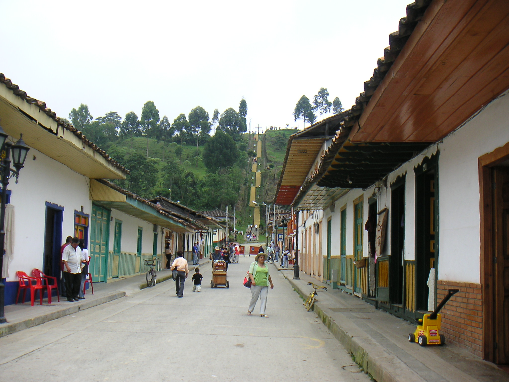 Description: Salento, Departamento del Quindio, Colombia Source: Louise Wolff (darina), March 2005